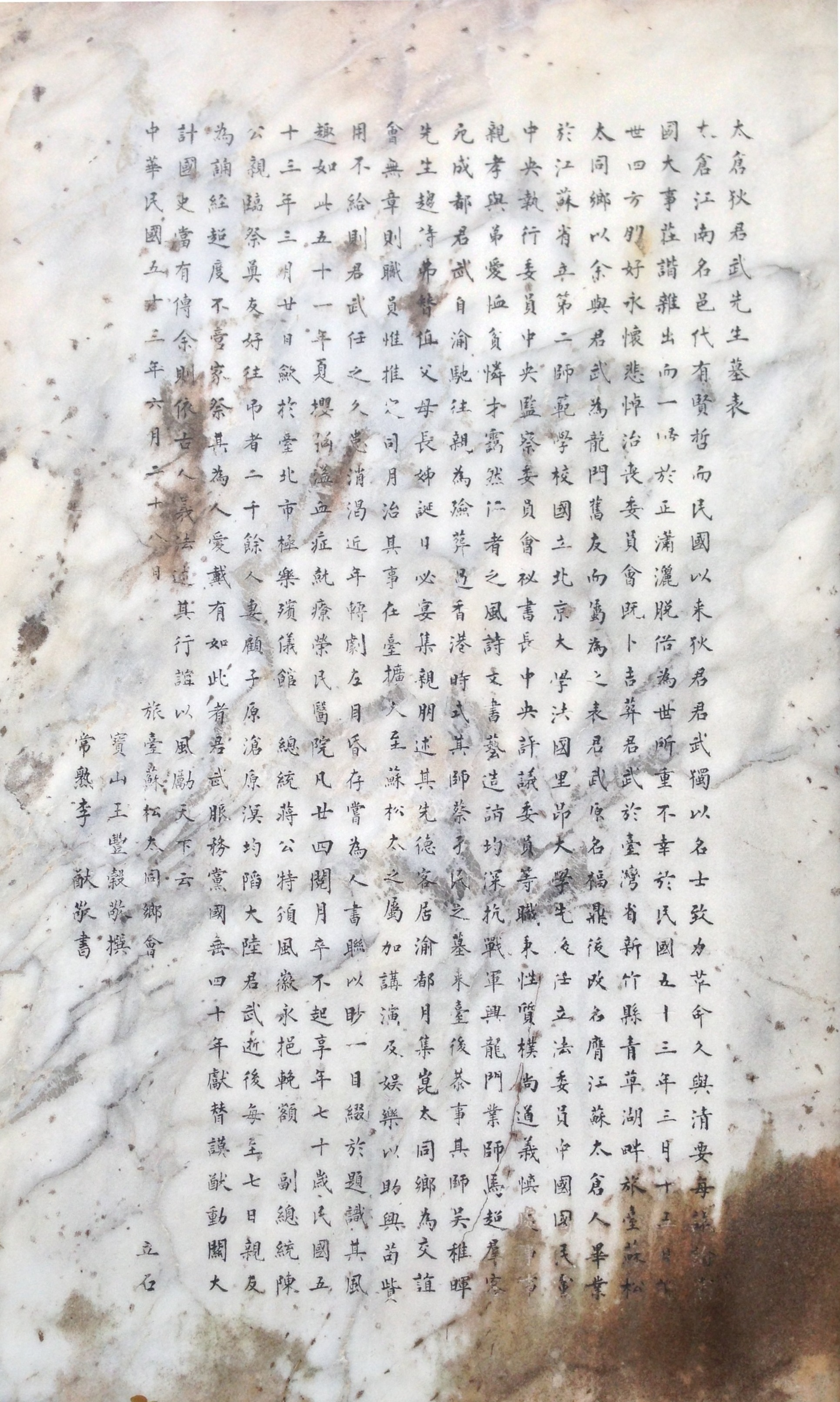 中文（台灣）: 太倉狄君武先生墓表